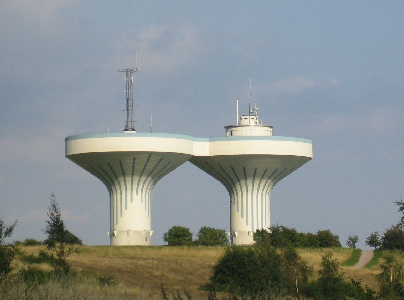 Twin water towers in Ystad, Sweden.